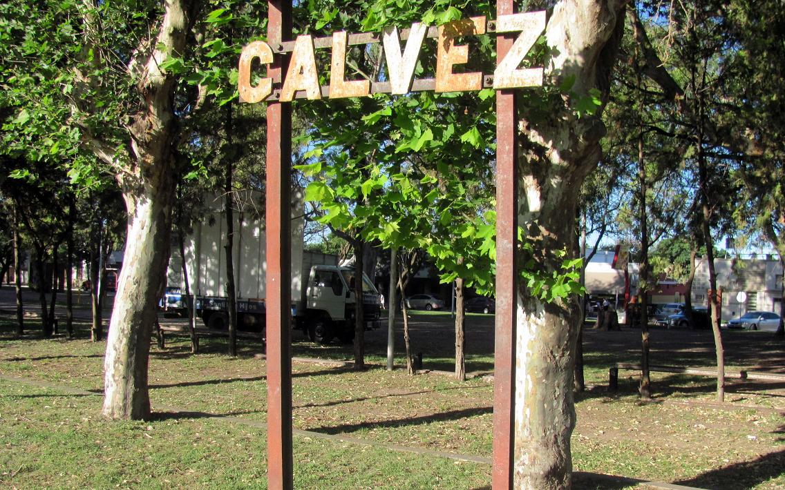 Estación Galvez, provincia de Santa Fe.